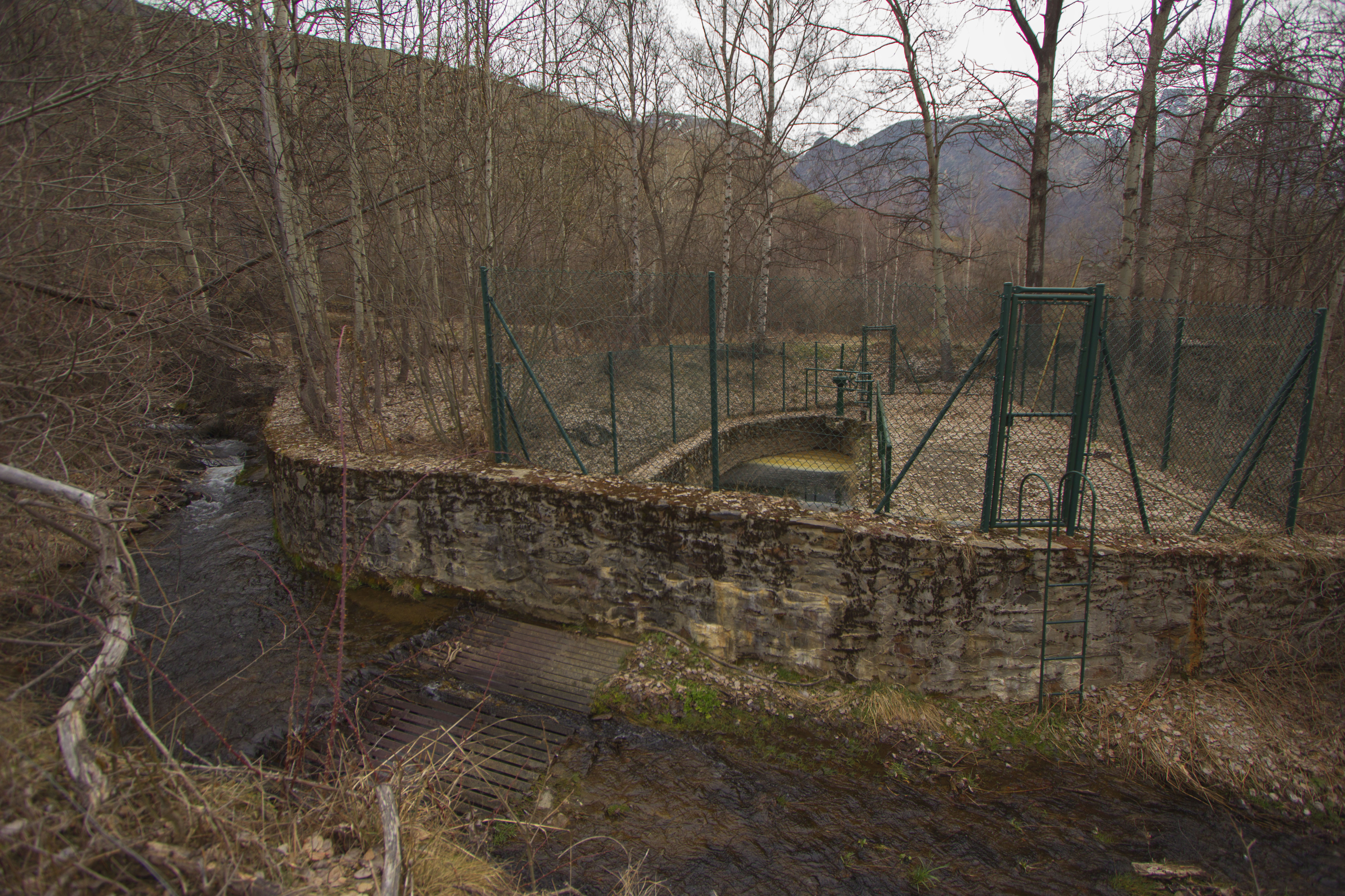 Resclosa d'Escorriols (Pallars Sobirà)